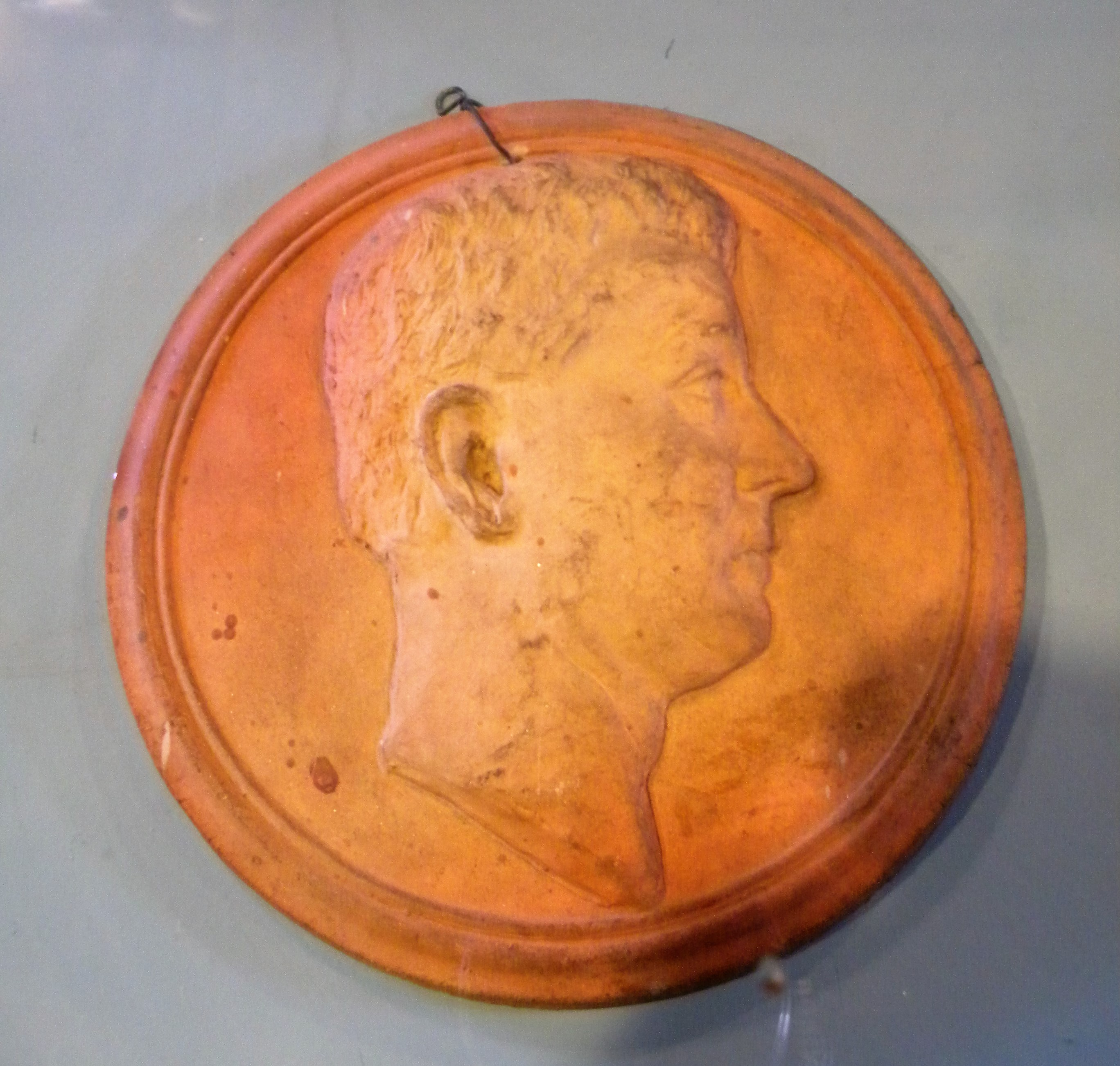 Médaillon bas-relief représentant Jacques Henry (fondateur de l'entreprise Emile Henry) 1822-1911 ; Musée de la Tour du Moulin de Marcigny